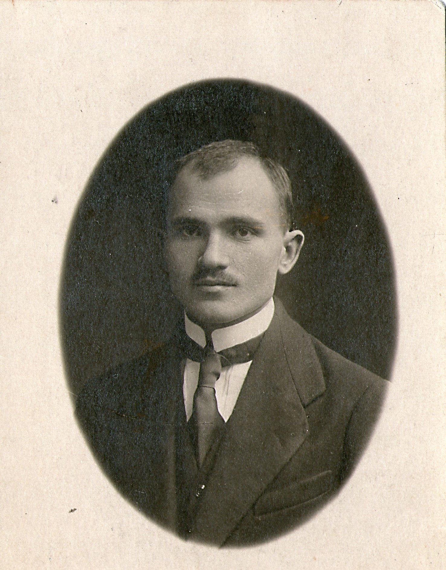 Беларуская (тарашкевіца): Максім Гарэцкі, 1920-я